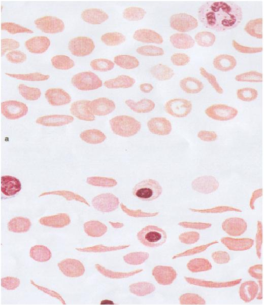 Орақтәрізді жасушалы гемолиздік анемия: а – гетерозиготтық; б – гомозиготтық түрі